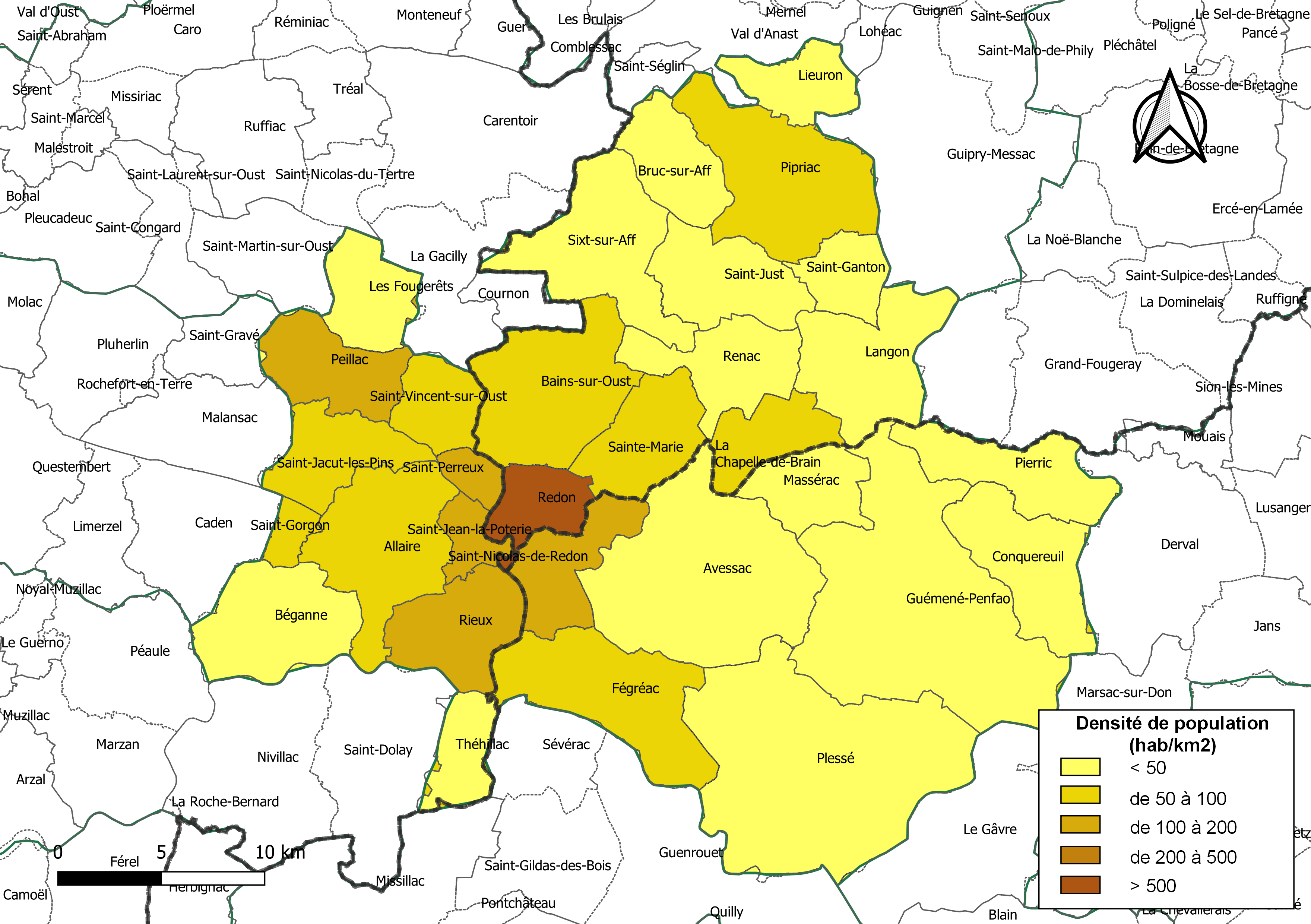 Carte des densités de population (millésimée 2016) des communes de l'intercommunalité Redon Agglomération, département d'Ille-et-Vilaine, France. Composition au 1er janvier 2019.